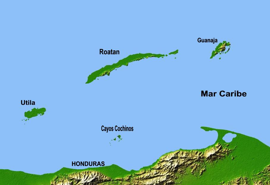 Mapa de las Islas de la Bahia, Honduras